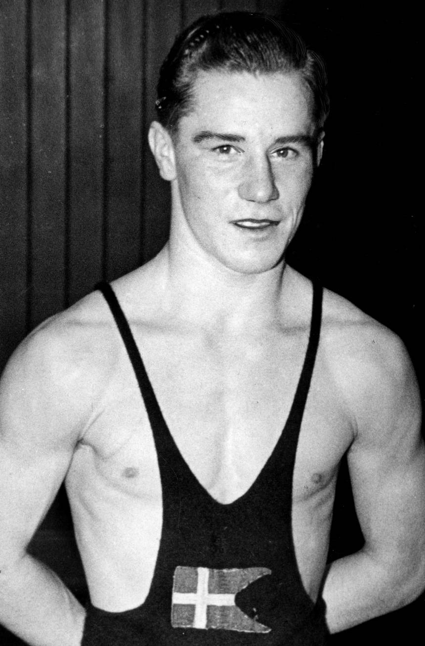 Leo Cortsen